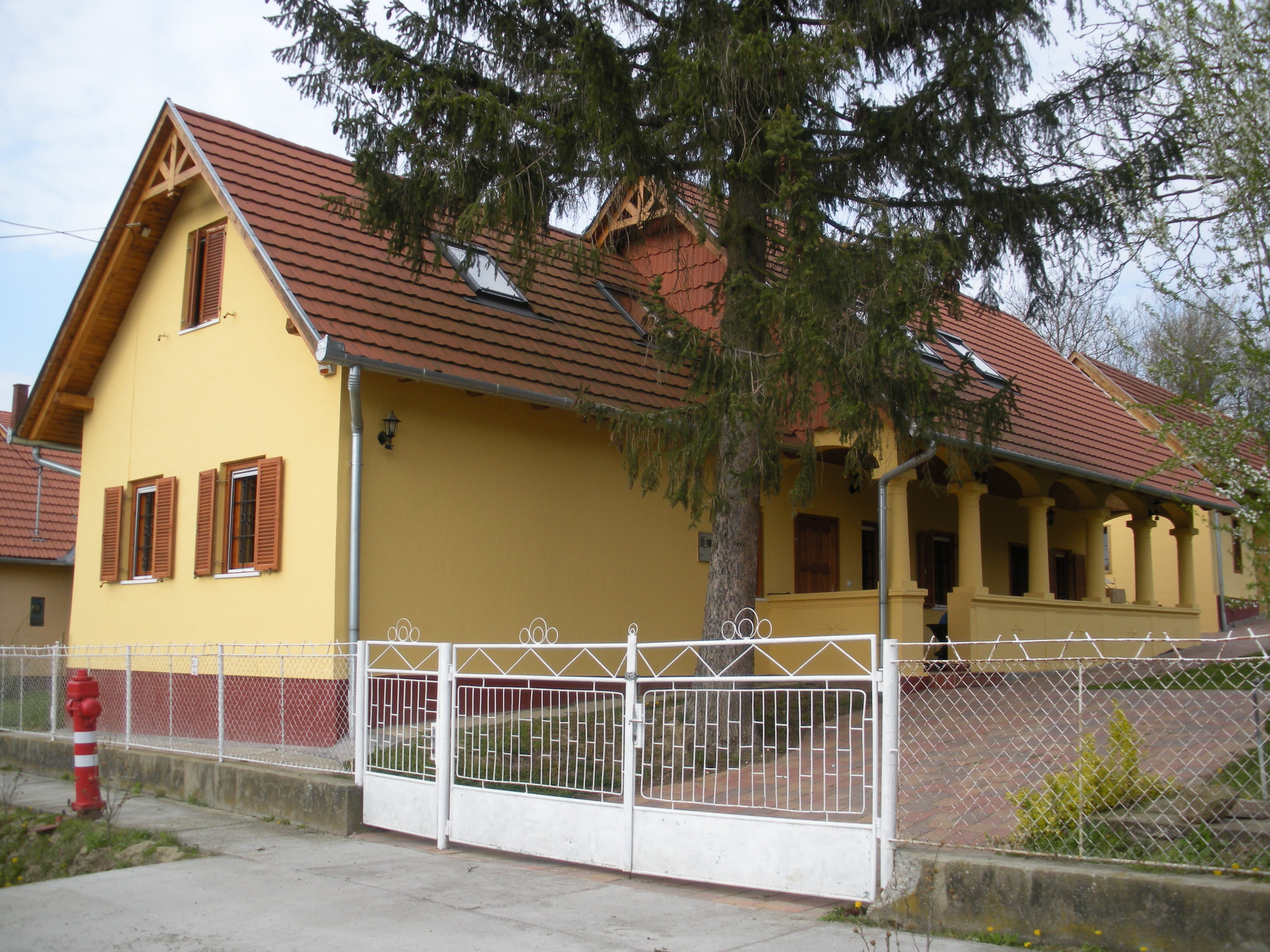 Jellegzetes zalamerenyei parasztház, Zalamerenye, Zala megye